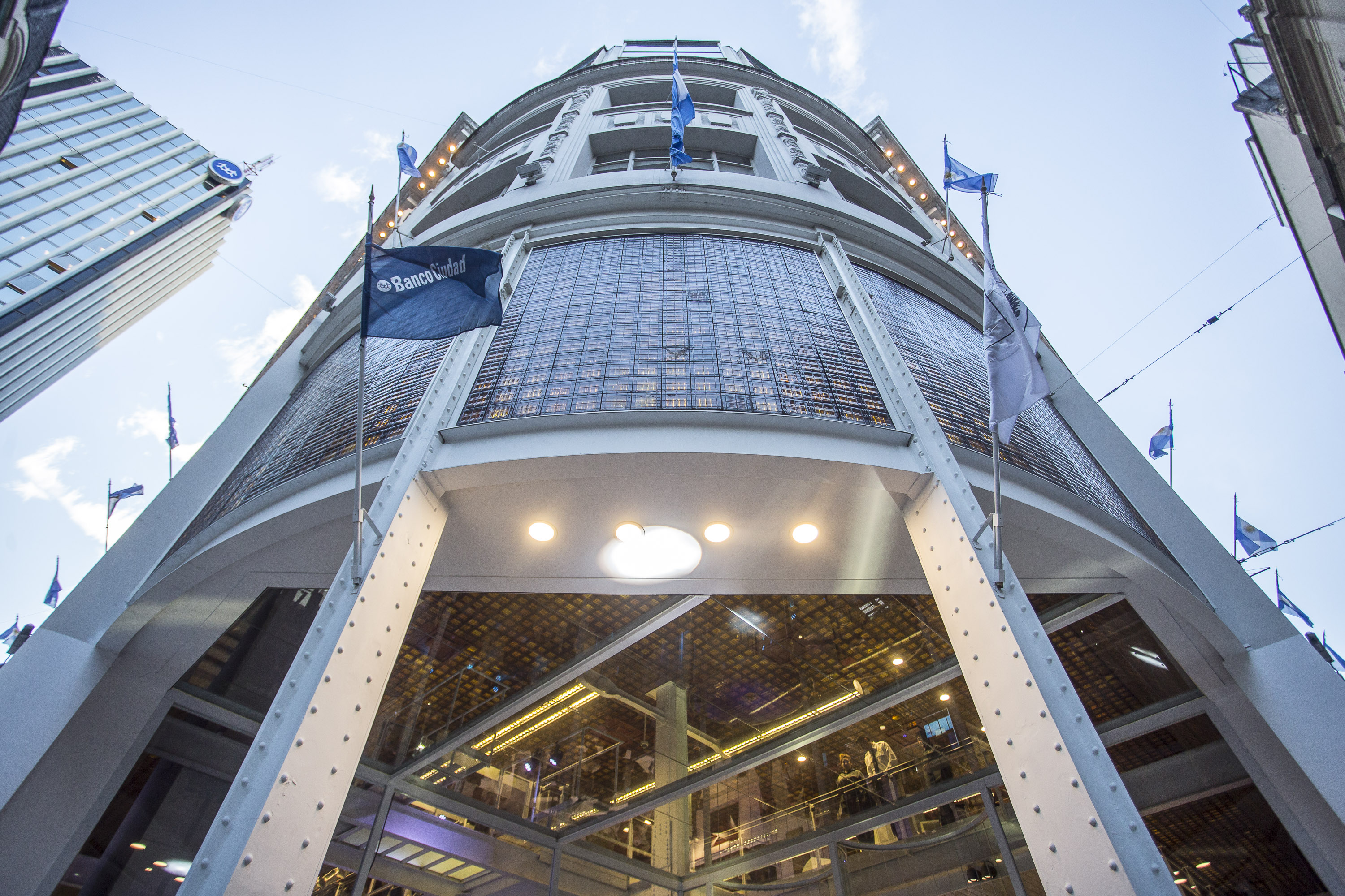 La sede central del Banco Ciudad, emblema arquitectónico de Buenos Aires, fue remodelada y puesta en valor en 2016